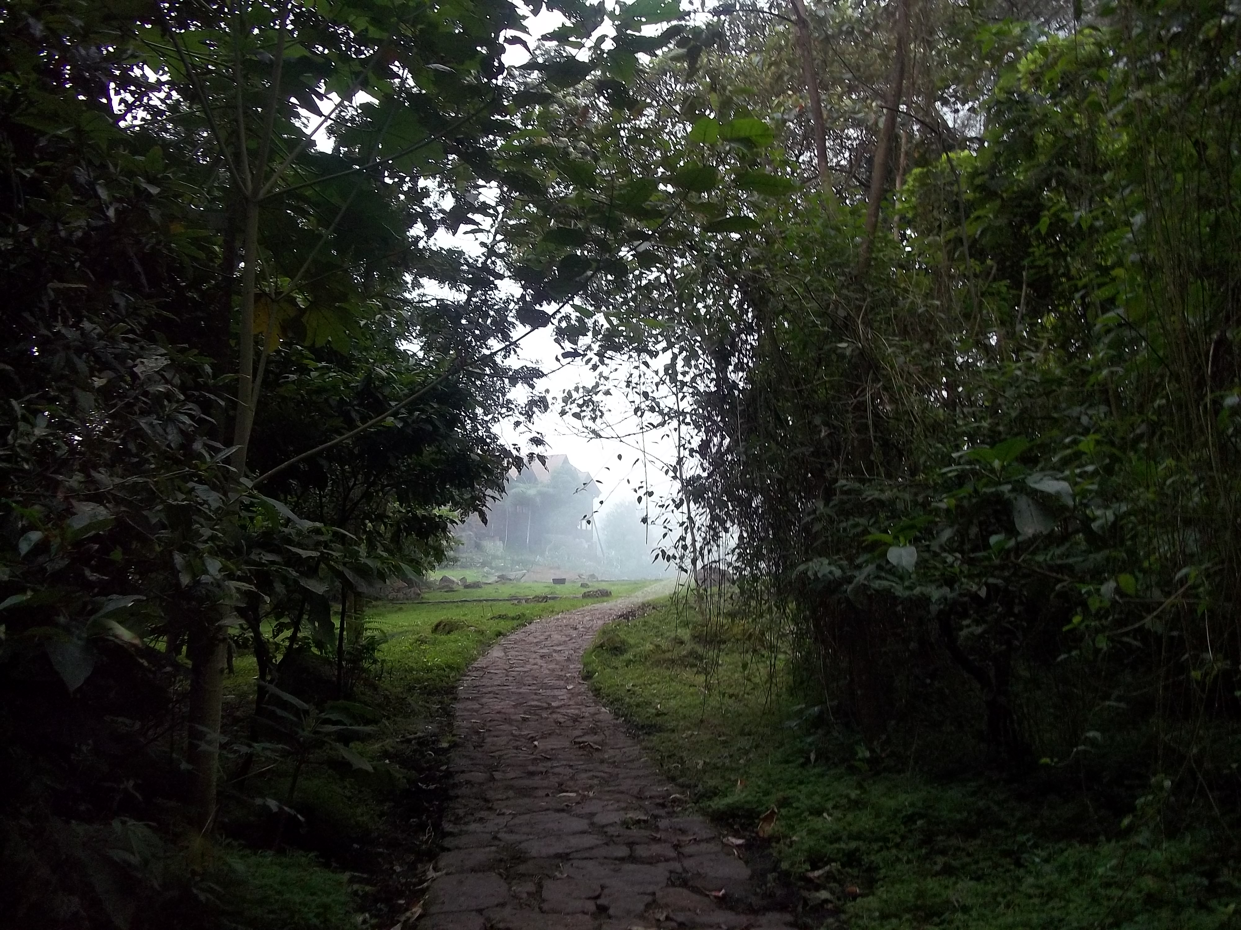 Todo el parque esta cruzado por hermosos senderos donde se respira paz y tranquilidad.